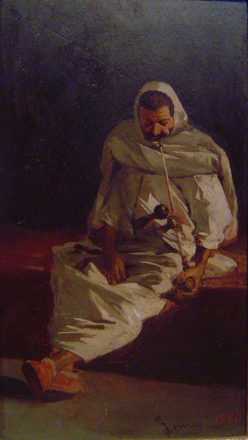 Moro. pintura sobre taula. Biblioteca Museu Víctor Balaguer